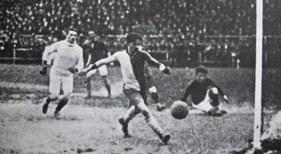 Finale de la Coupe de France de football 1919-1920 entre CA Paris et Le Havre AC au stade Bergeyre. Le défenseur havrais André Grivel sauve son gardien sous les yeux d'Ernest Gravier, à droite.